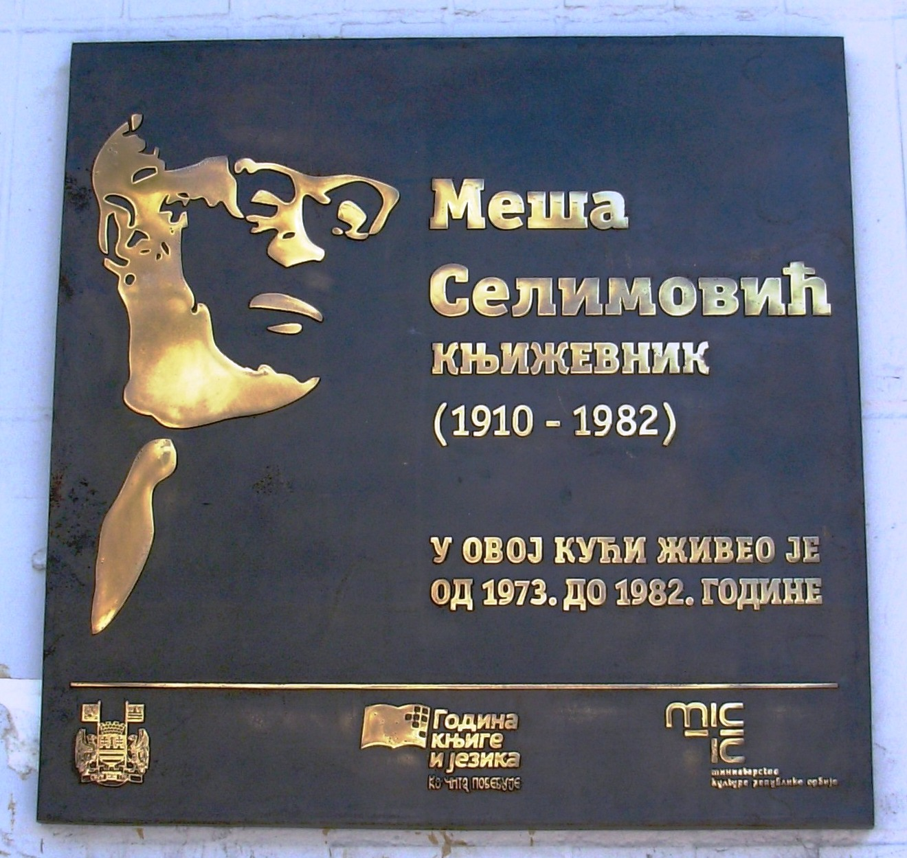 Tabla na zgradi u kojoj je stanovao Meša Selimović, Beograd, ugao Gospodar Jovanove i Višnjićeve ulice. Slikao Goldfinger